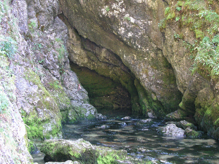 Quelle des Doubs bei Mouthe